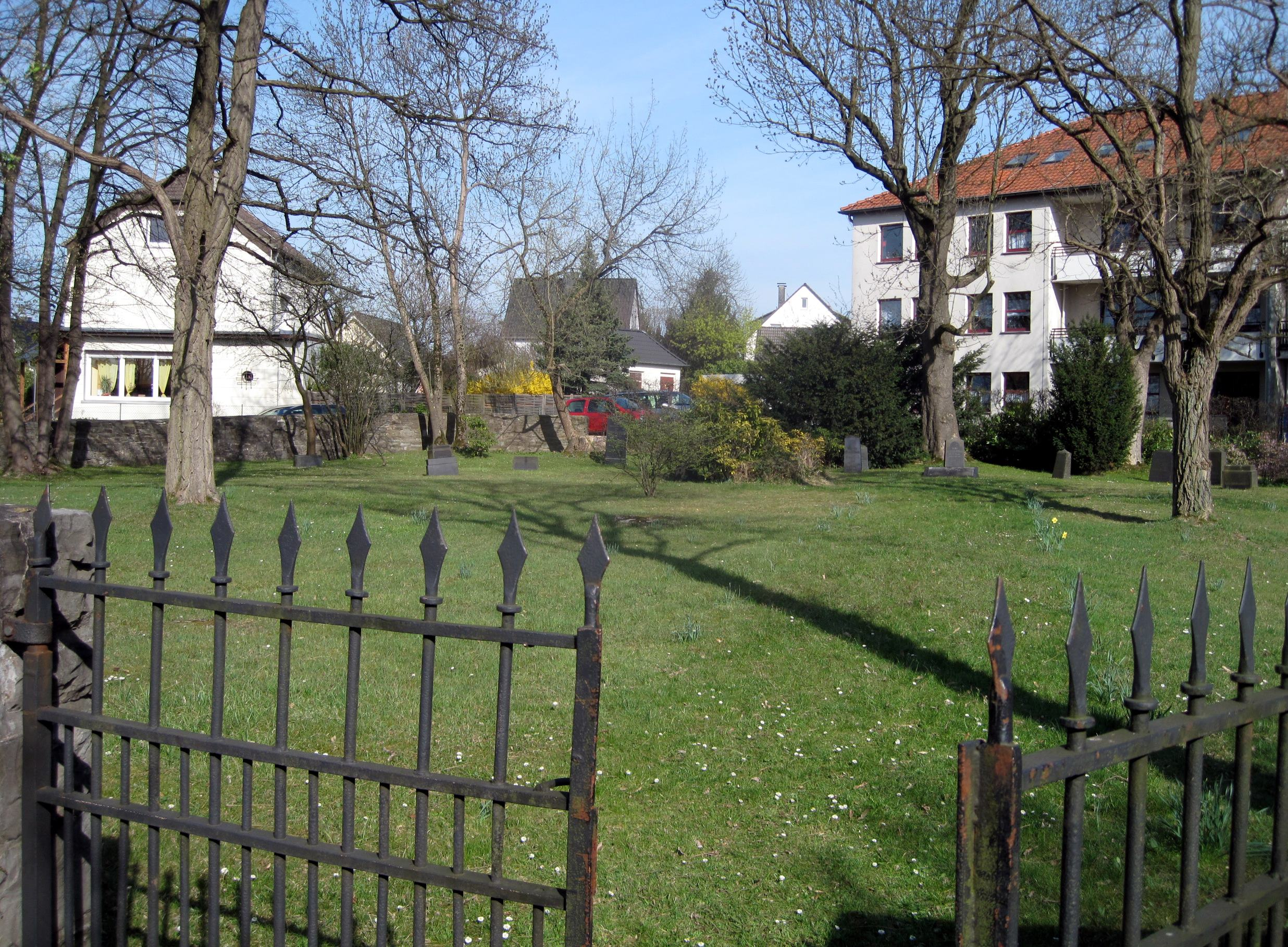 Jüdischer Friedhof, Dördelweg in Iserlohn. Denkmal seit 10. Februar 2005.